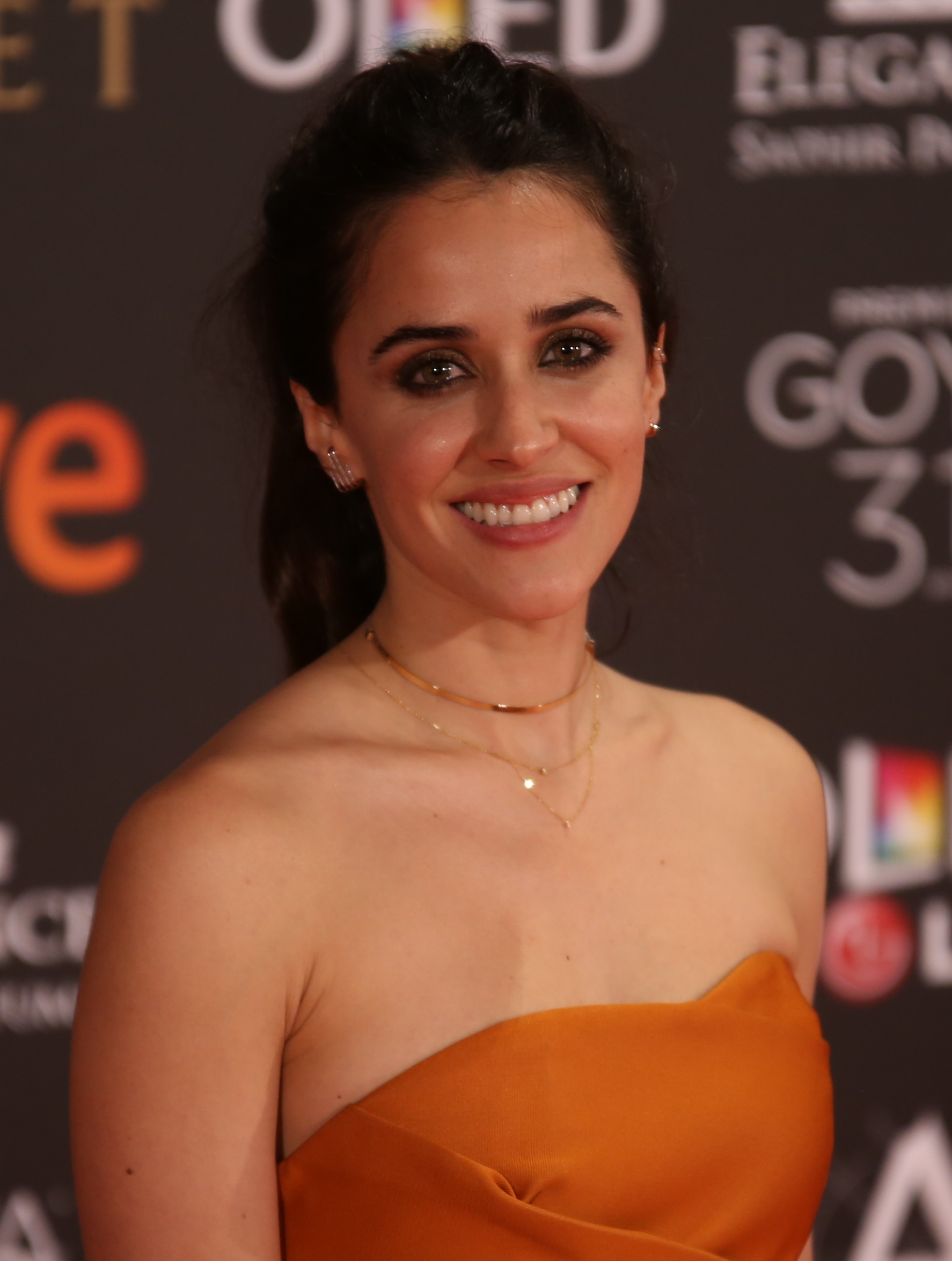 Premios Goya 2017